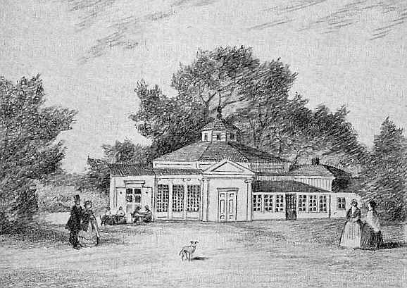 Rotundan i Humlegården, Stockholm omkring 1850. Teckning av Hilding Nyman